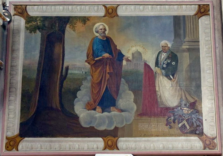 Sint Gerlachuskerk: Interieur, muurschildering met de afbeelding van Petrus Regout als weldoener van de kerk van Houthem-Sint-Gerlach met zijn patroonheilige Sint-Petrus, na de restauratie.